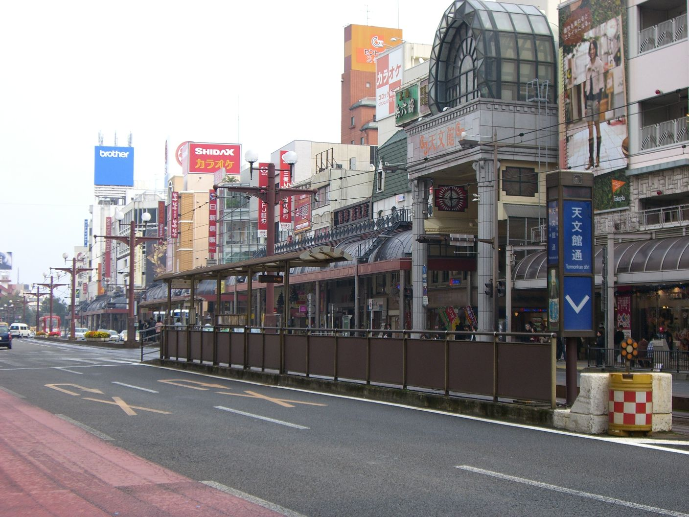 Tenmonkandori tram stop at Kagoshima City, Kagoshima, Japan.(天文館通駅)